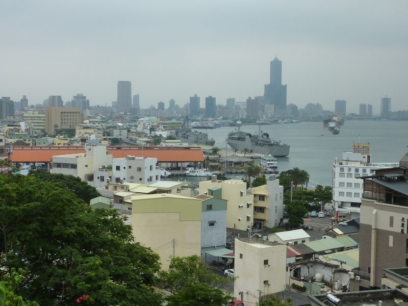 高雄左營。